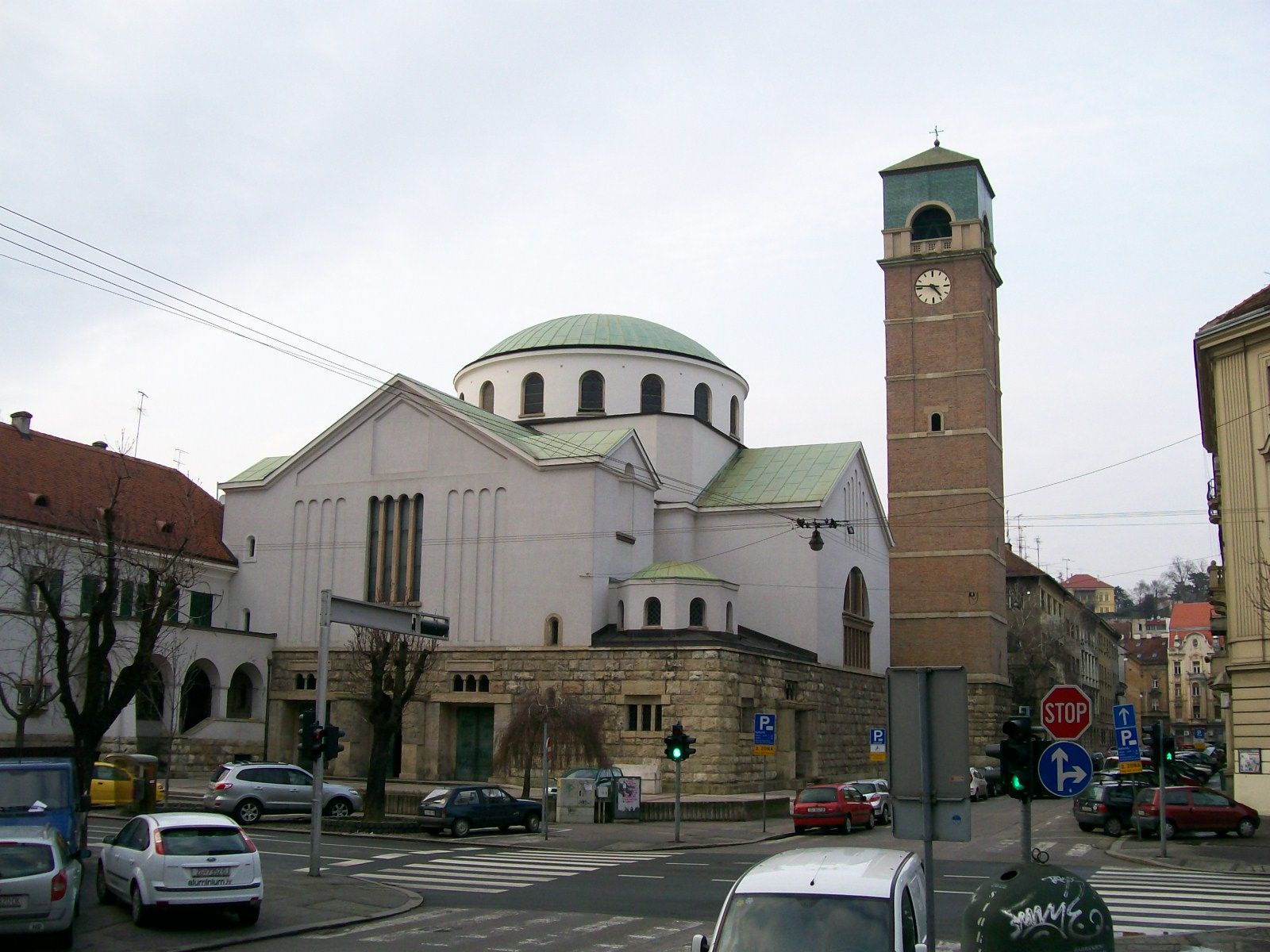 Crkva Sv. Blaža, Zargeb.